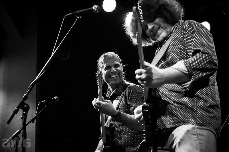 Mrakoplaš v Malostranské Besedě, 2016